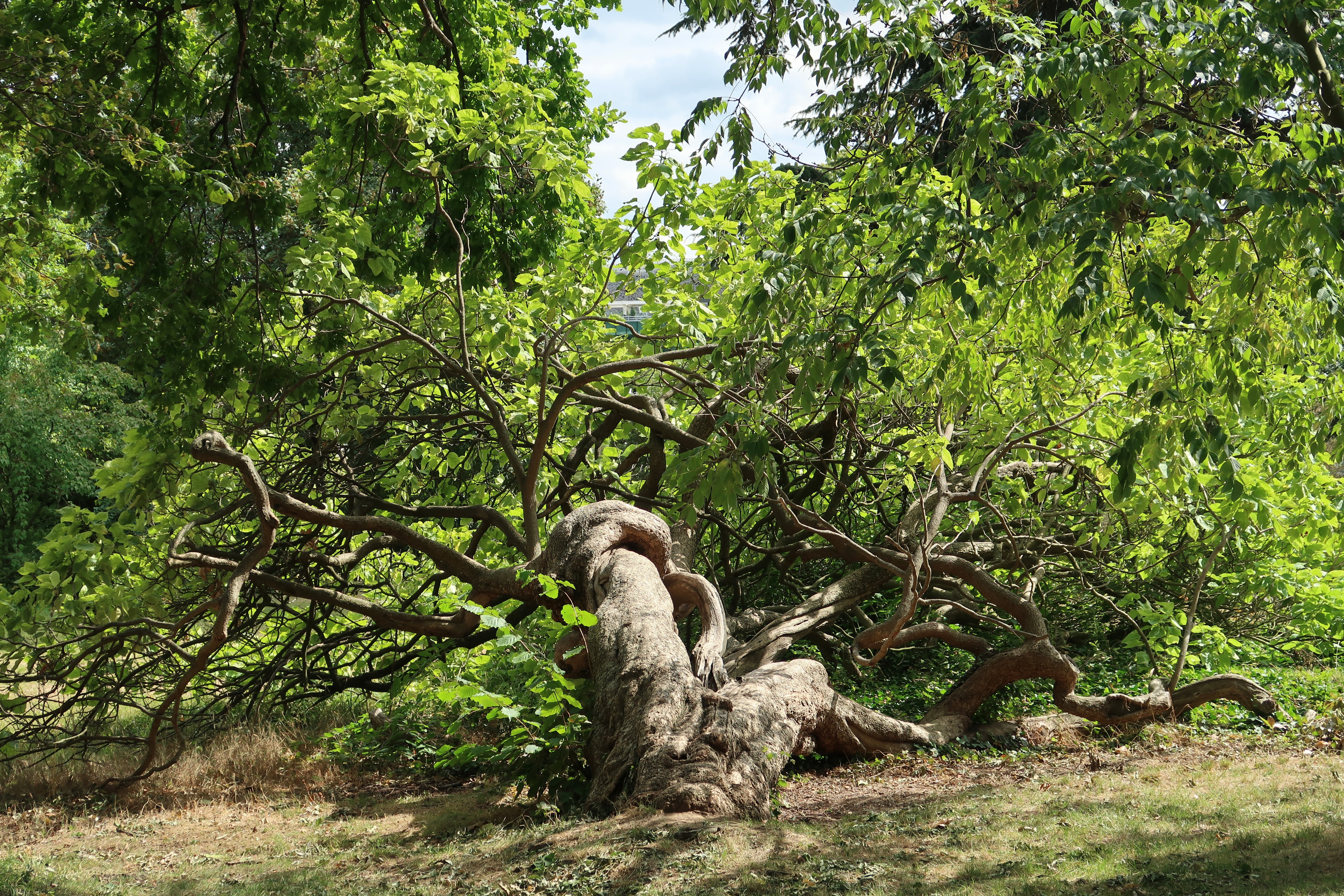 Jardin des serres d'Auteuil (Paris, 16e).